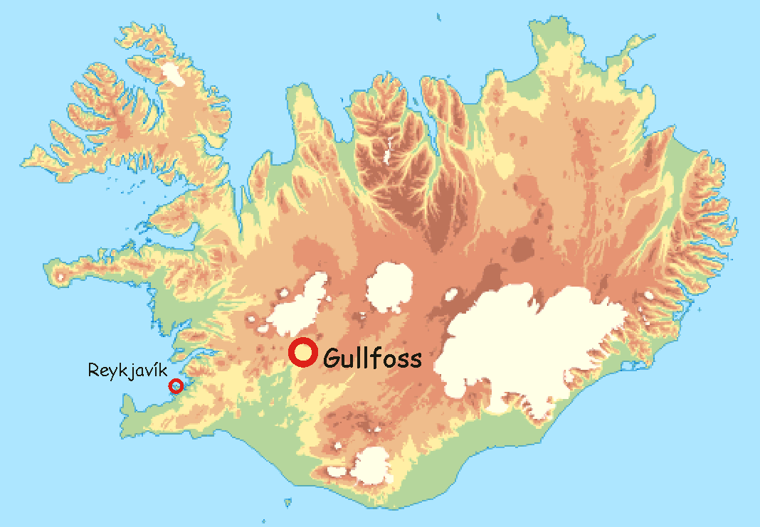 Localisation de Gullfoss